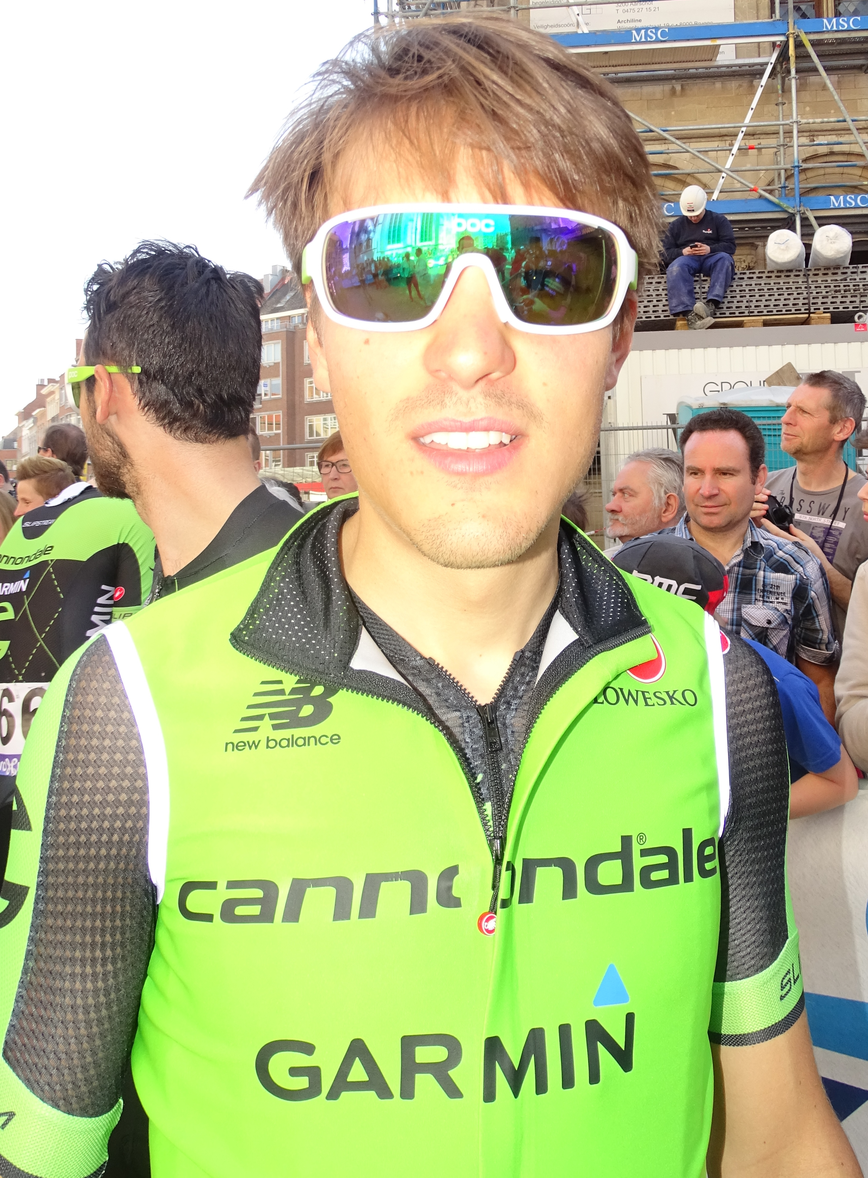 Reportage réalisé le mercredi 15 avril à l'occasion du départ de la Flèche brabançonne 2015 à Louvain, Belgique.